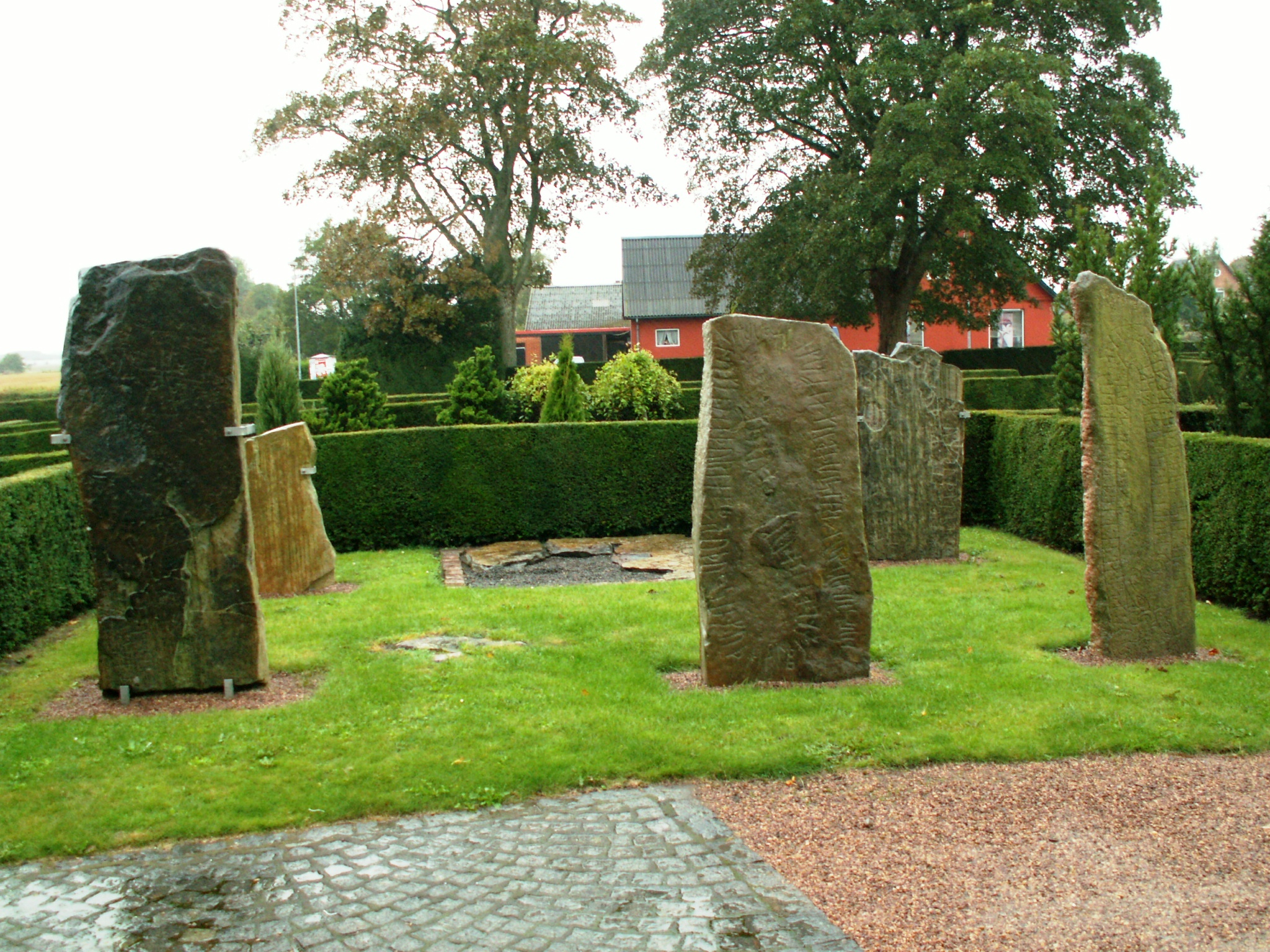 kamienie runiczne